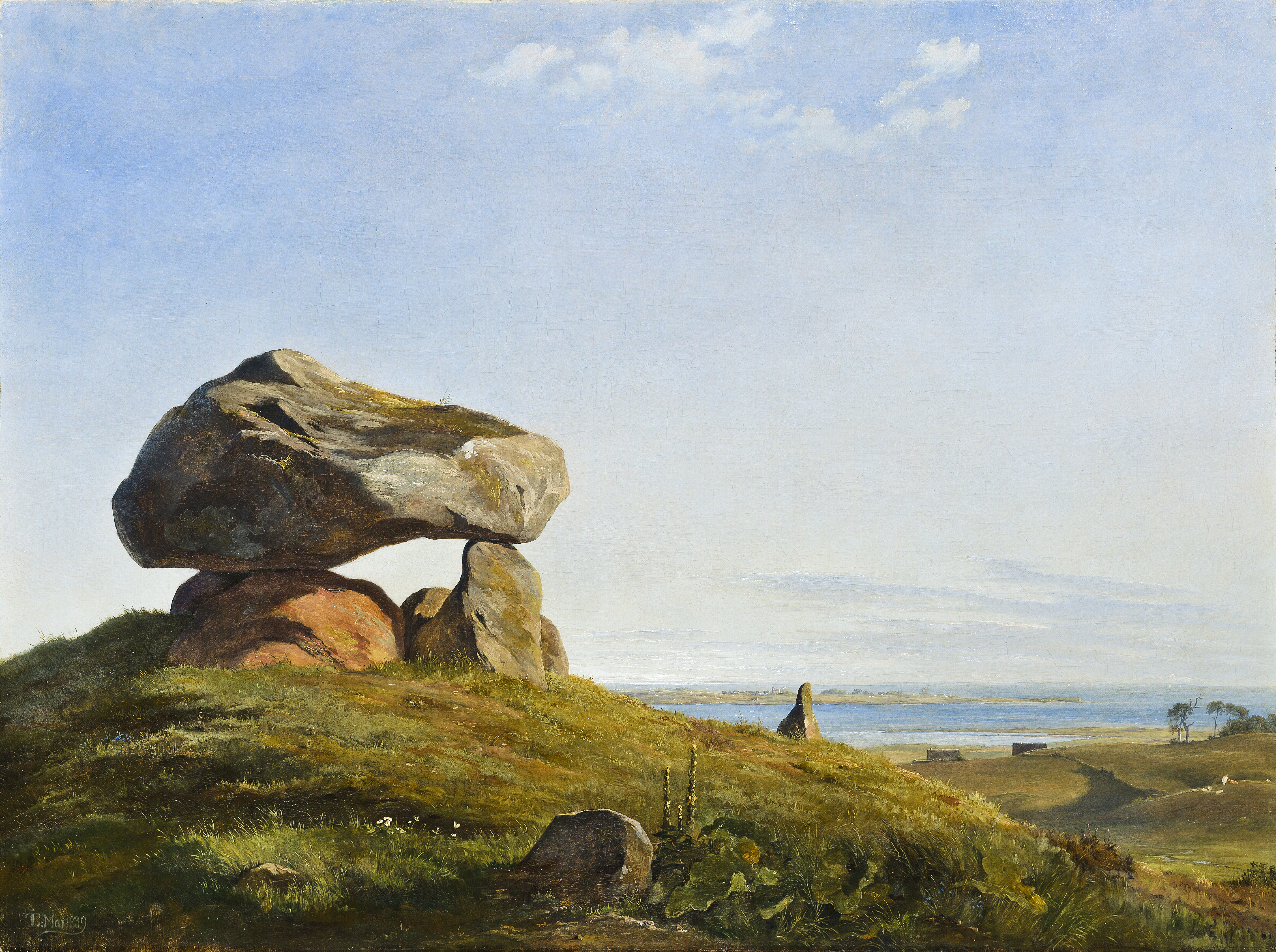 Johan Thomas Lundbyes maleri "En gravhøj fra oldtiden ved Raklev på Refsnæs" fra 1839.